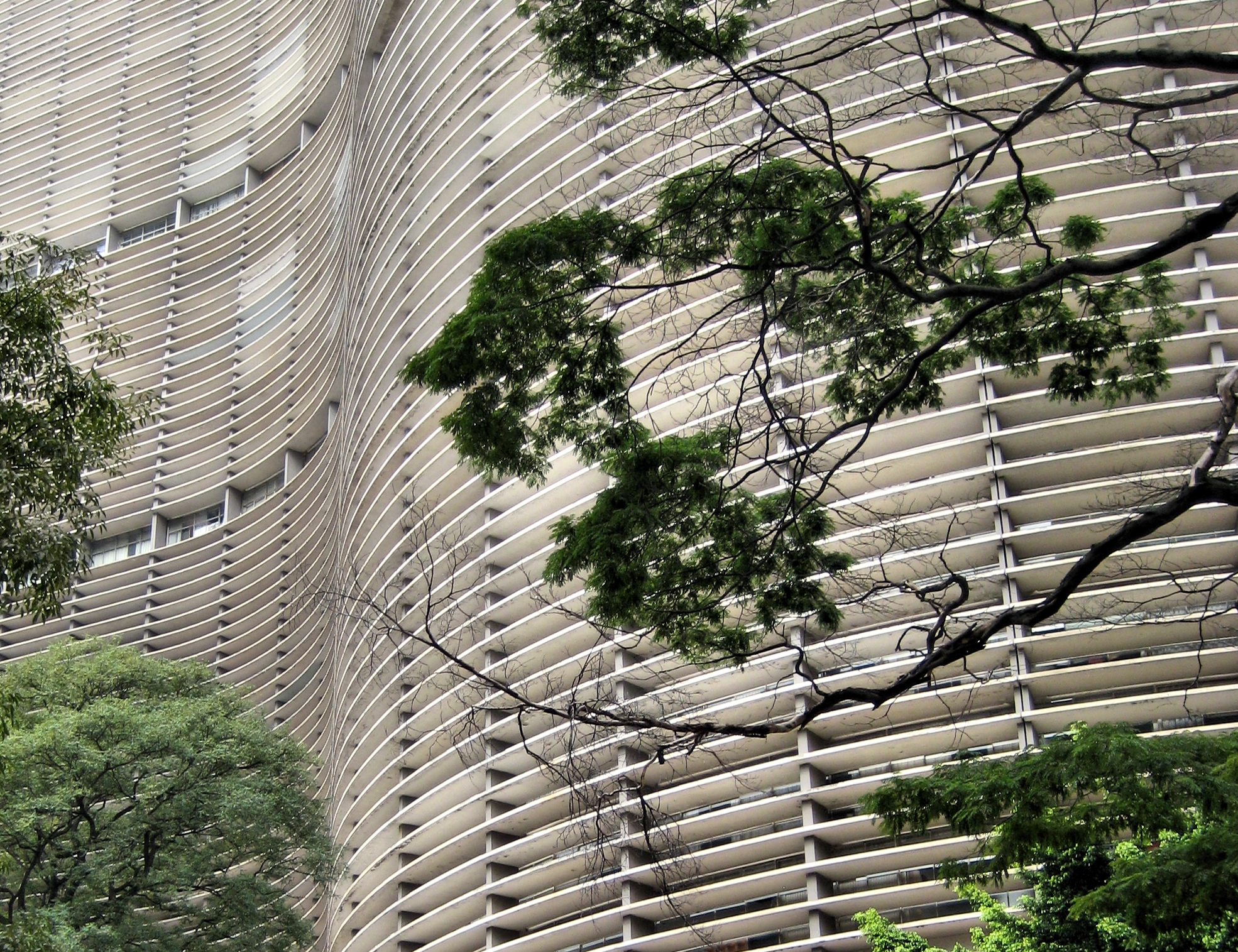 Copan detail